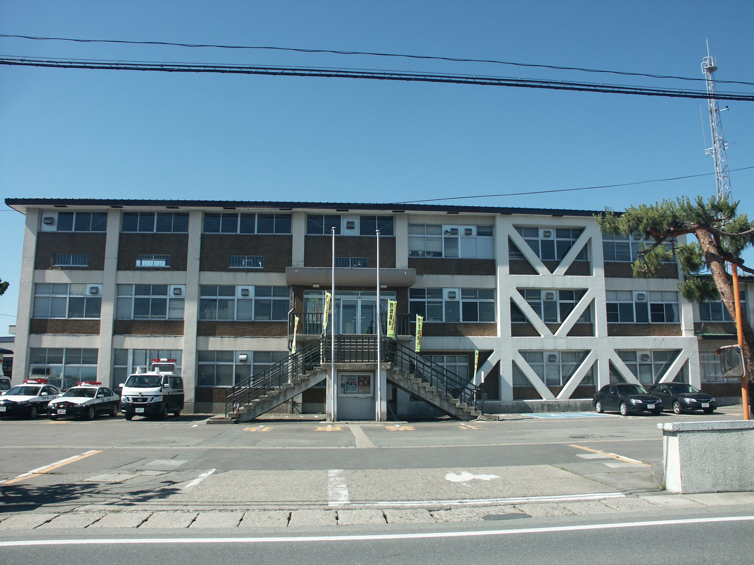 山形県新庄警察署庁舎